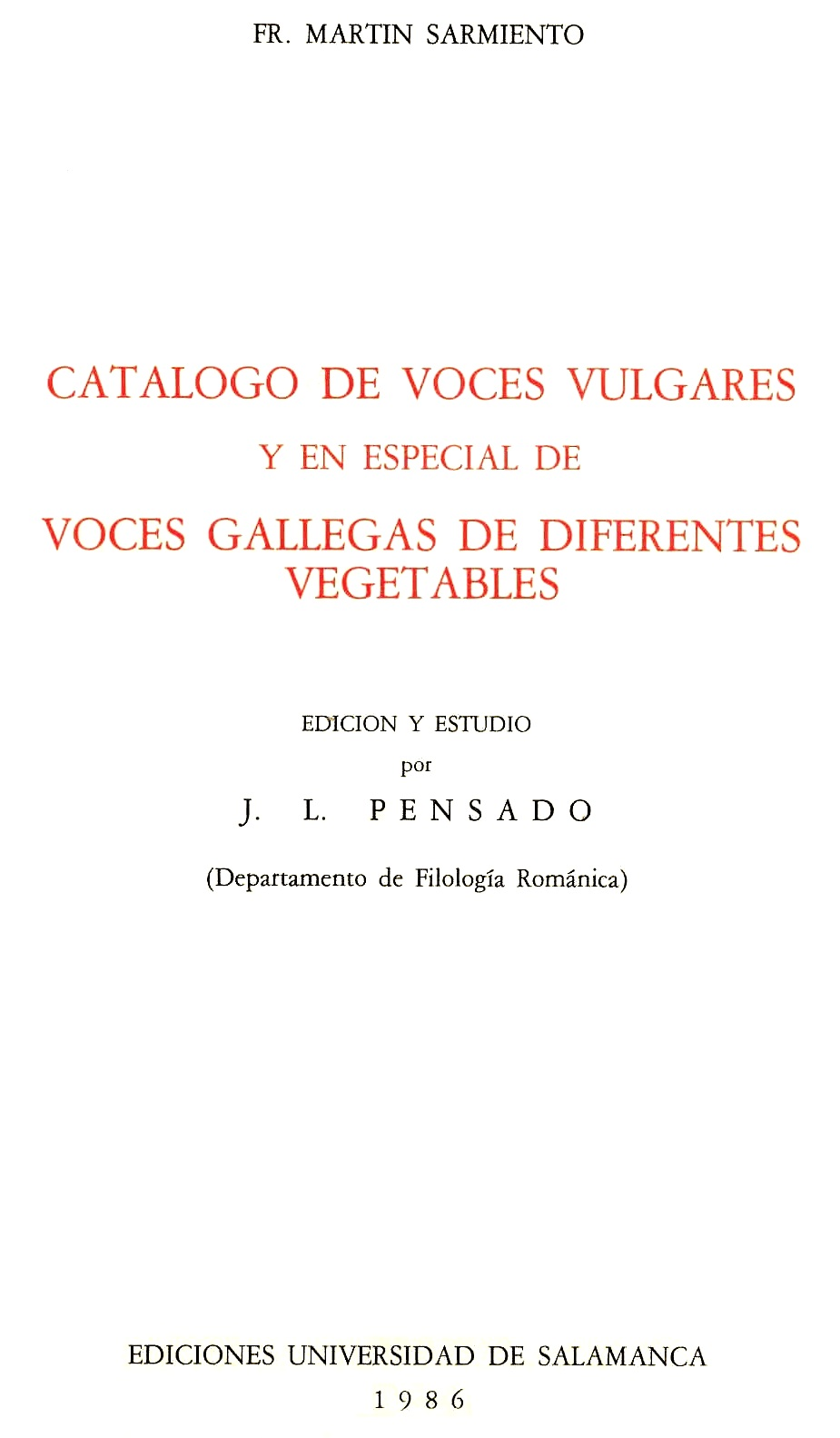 Fr. Martín Sarmiento. Catálogo de voces vulgares y en especial de voces gallegas de diferentes vegetales. Edición y estudio por José Luis Pensado (Departamento de Filología Románica). Ediciones Universidad de Salamanca. 1986.